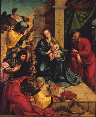 De acordo com uma nota escrita pelo Dr. José de Figueiredo no Livro 1º da Entrada de Correspondência, os seis quadros que formam o retábulo dito de Santos-o-Novo, estavam no coro de baixo da igreja do respectivo mosteiro no ano de 1911, data da entrada do conjunto no Museu das Janelas Verdes. Passa-se a transcrever parcialmente o documento citado (fl.6): "Em 22 do corrente (Agosto de 1911) esteve o Director do Museu no Recolhimento de Santos-o-Novo a receber vários objectos ali existentes, em virtude do despacho do Ex.mo Ministro da Justiça. Esses objectos, entregues ao Director na presença de dois vogais da Comissão Jurisdicional das Extintas Congregações, são: 6 quadros de madeira do século XVI escola de Lisboa, representando respectivamente a «Anunciação», «Natividade», «Adoração dos Reis Magos», «Cristo no Horto», «Enterro de Cristo» e «Ressurreição de Cristo» e estavam no coro de baixo da referida Igreja;..." (cf. João Couto, O retábulo quinhentista de Santos-o-Novo, p.13, nota 1).